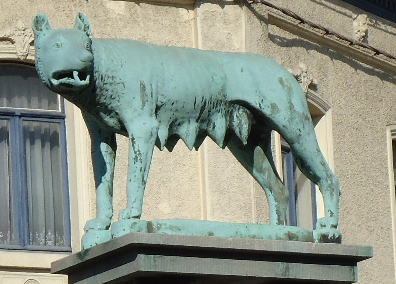 La Louvière